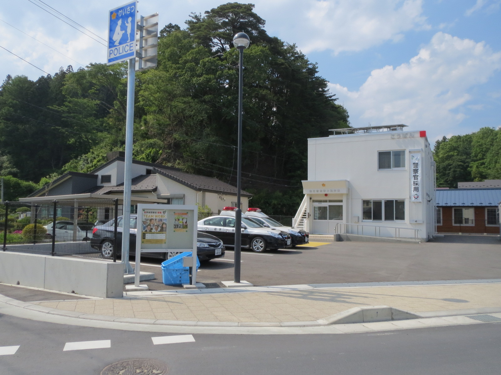 釜石警察署所管である３つの交番の一つであり、大槌町内にある唯一の交番。沢山地区にある。